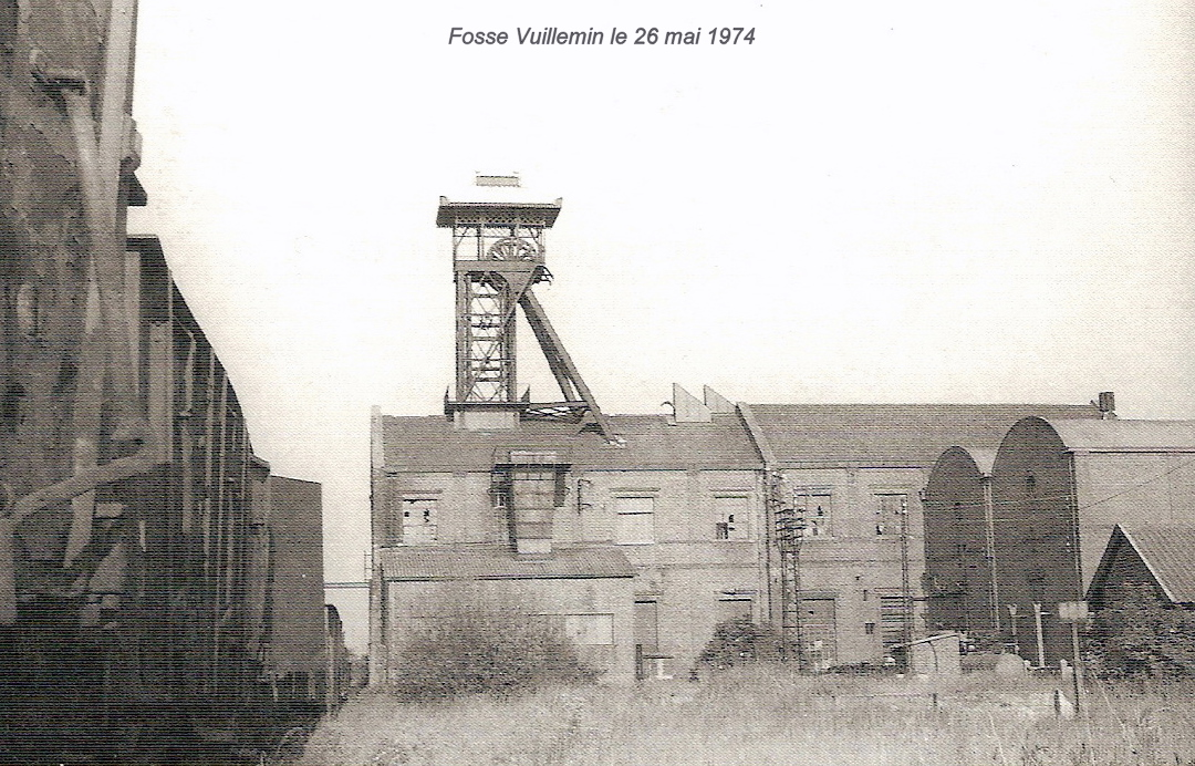 Ancienne fosse Vuillemin de Masny aujourd'hui disparue